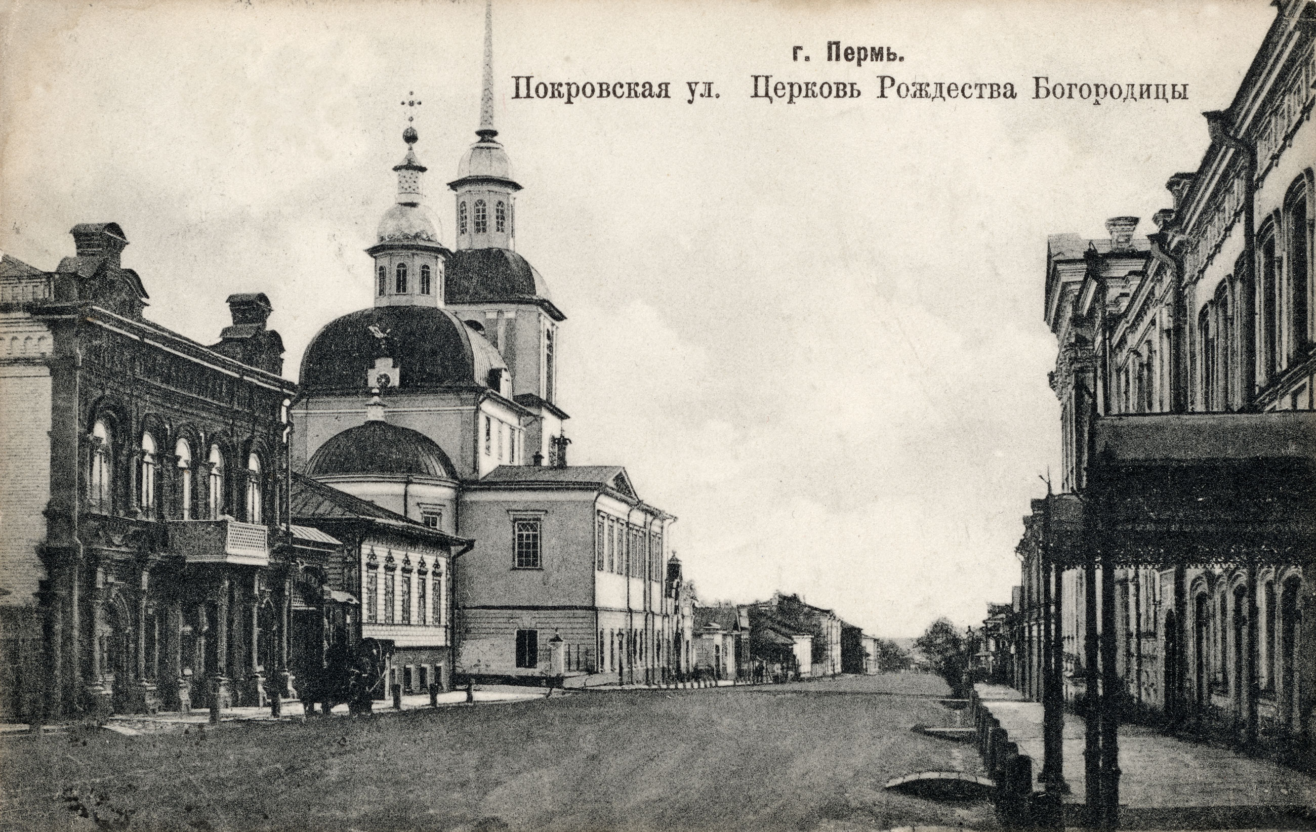 Ulitsa Pokrovskaya in Perm, Russia.